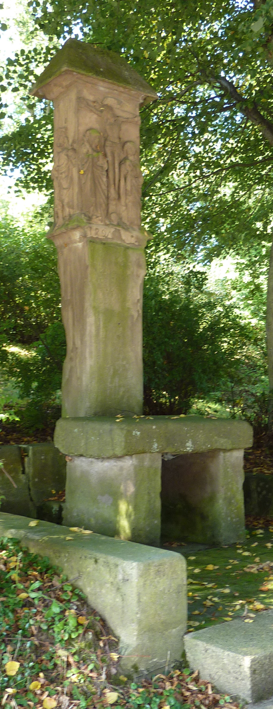 Bildwerk mit Kreuzigungsszene, hl. Sigismund und hl. Sebastian am Ortsausgang Seußling